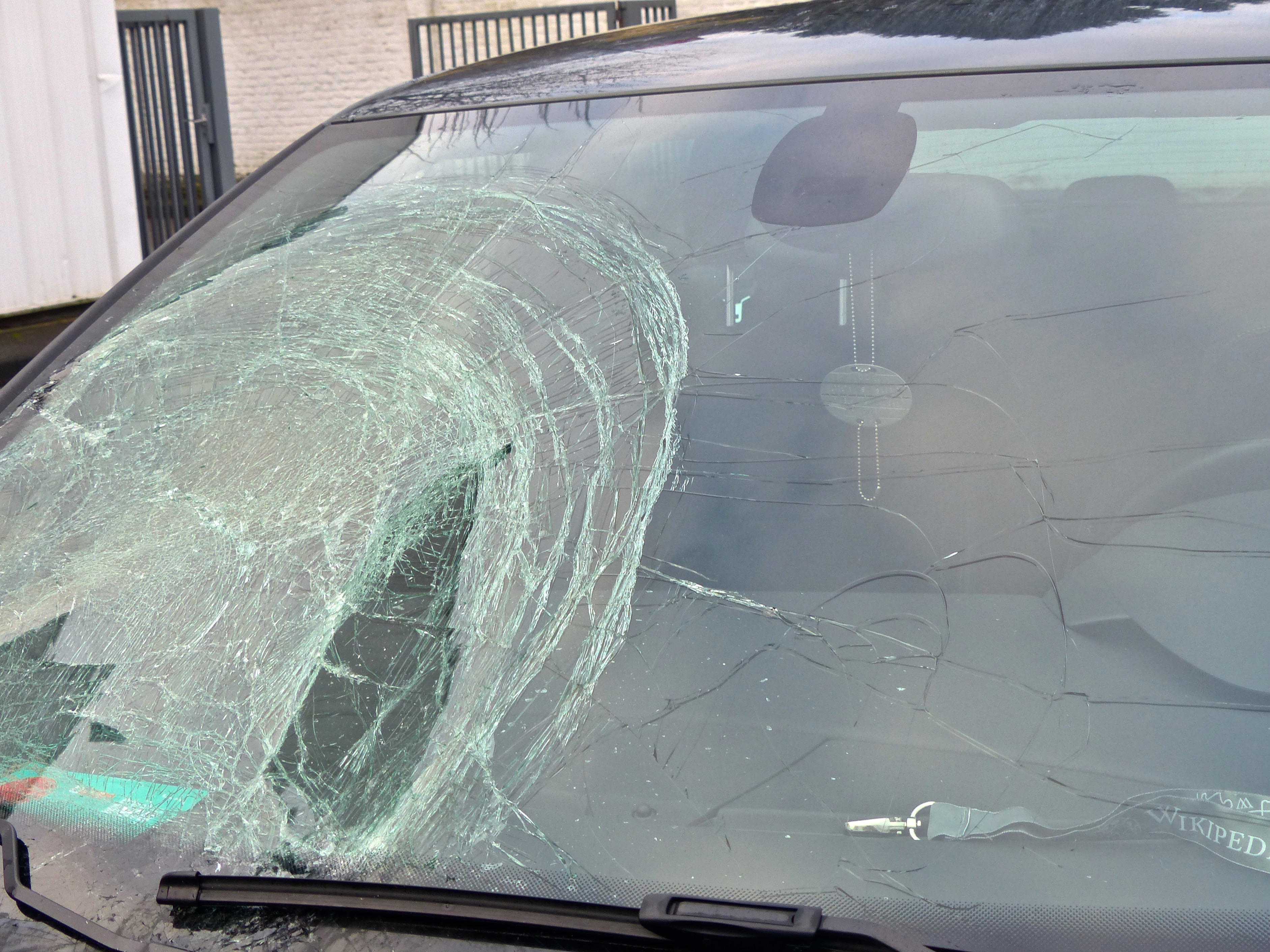 Sicherheitsverbundglas in einer Windschutzscheibe nach Einschlag einer losgelösten Eisplatte von einem LKW